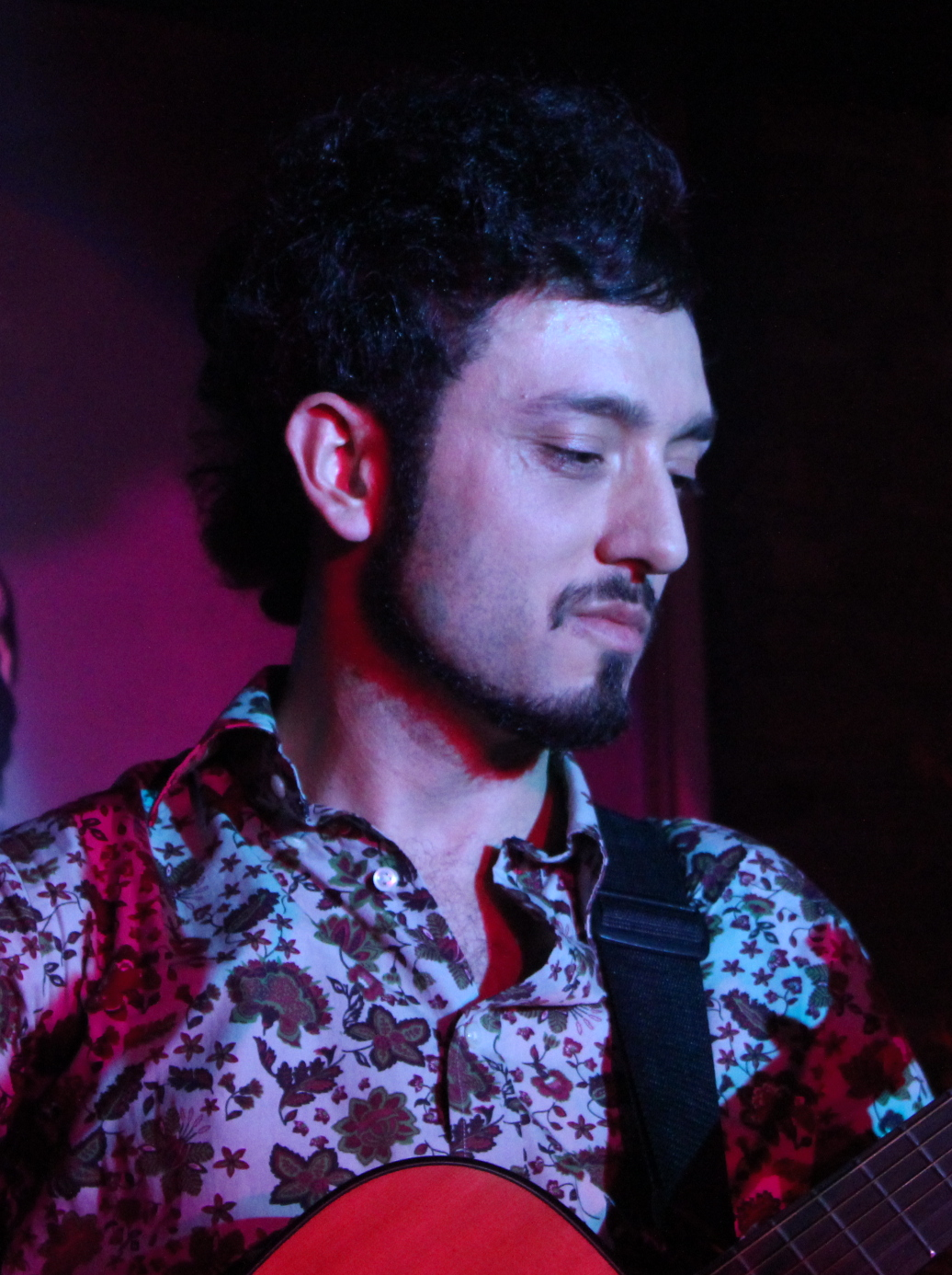 Mabel Matiz, Ankara Passage Pub'da 30 Kasım 2011'de düzenlediği konserinde.